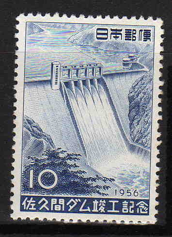 日本のja:佐久間ダムの竣工記念切手